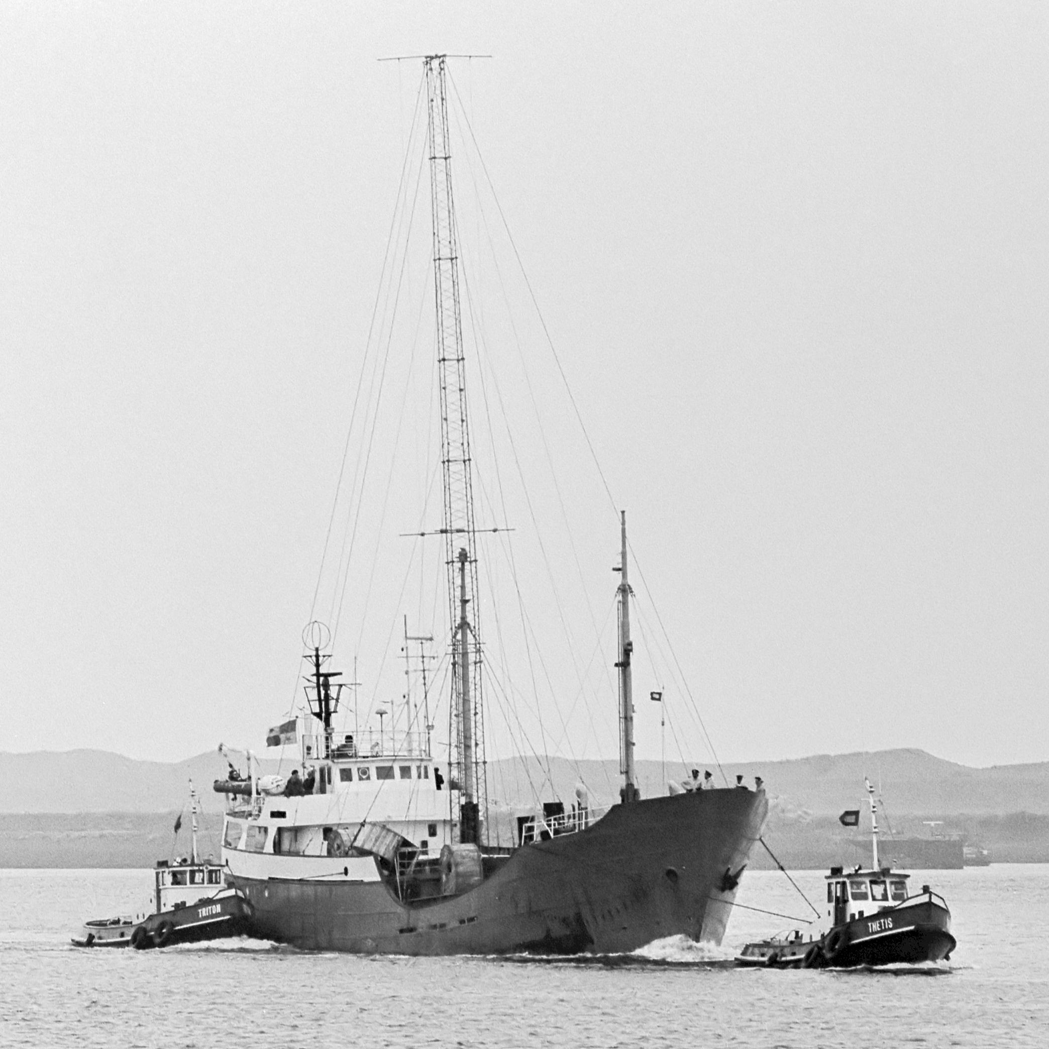 Zendschip Magda Maria , Radio Paradise wordt door de rijkspolitie de haven van IJmuiden binnengesleept 1 augustus 1981